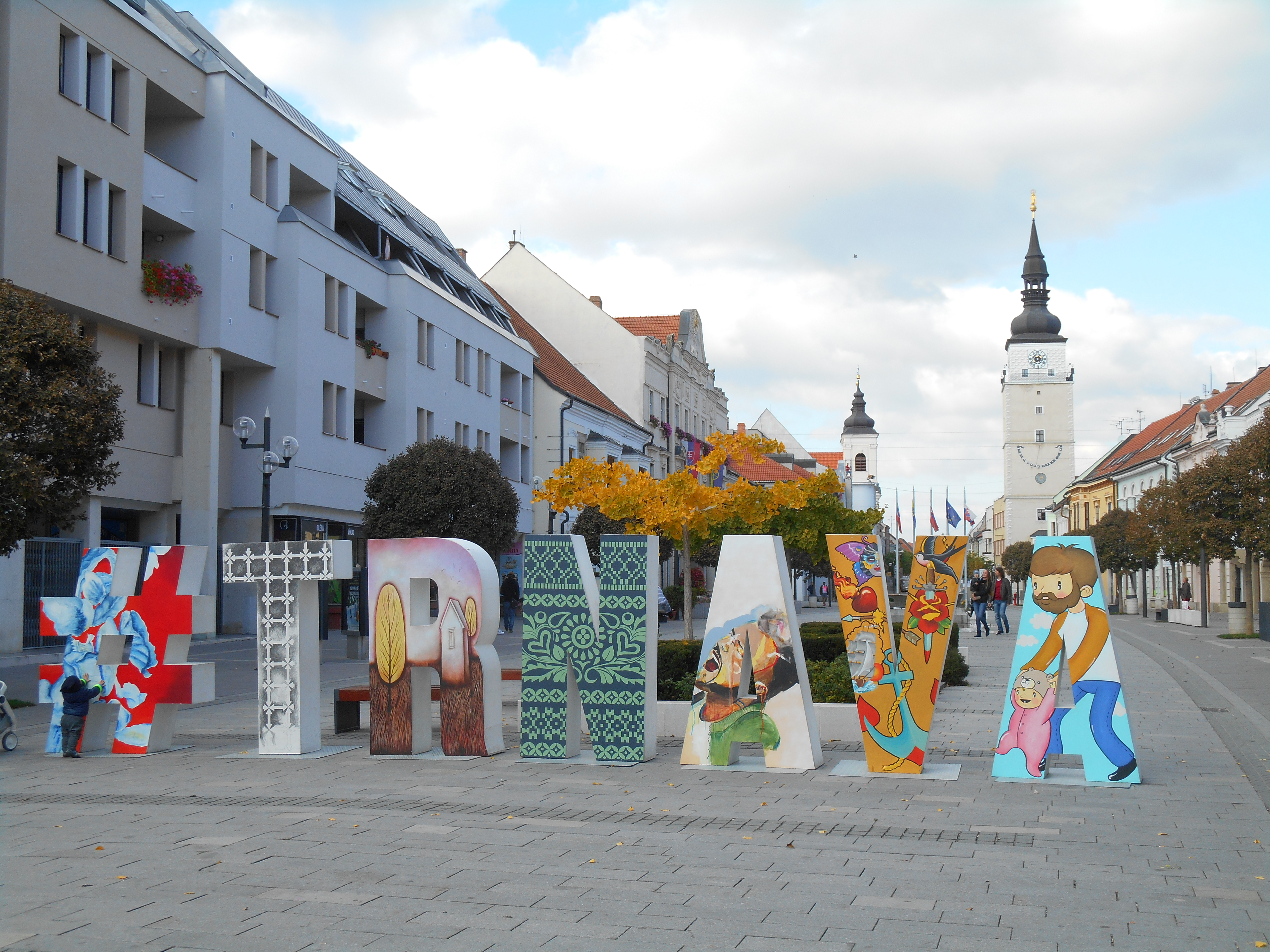 Pešia zóna Trnava